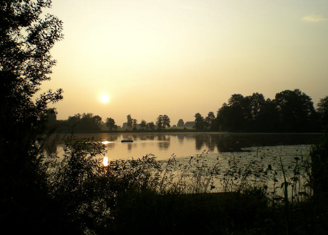 Inkwilersee Sonnenaufgang